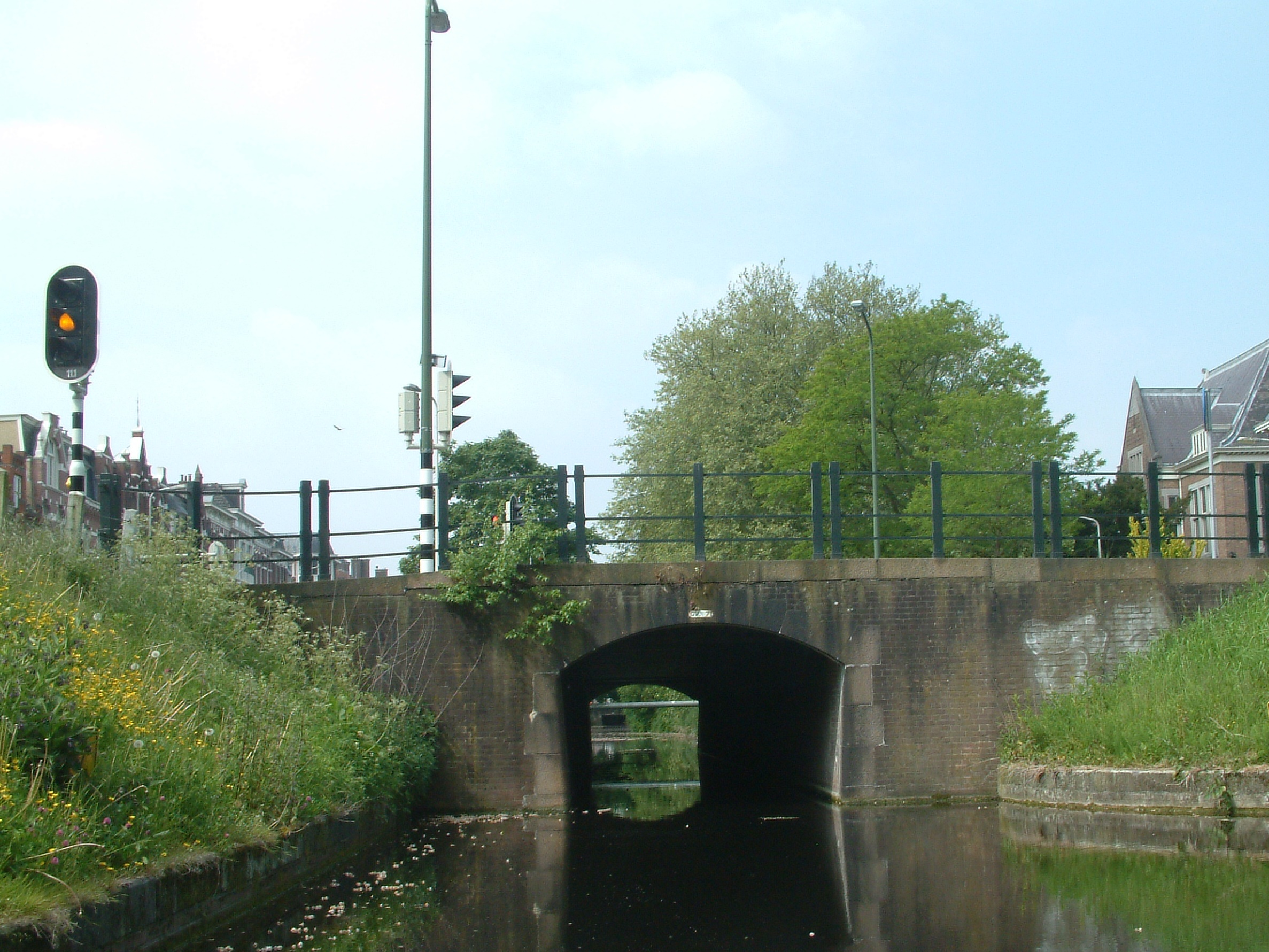 Bridges in The Hague as mentioned in the filename.